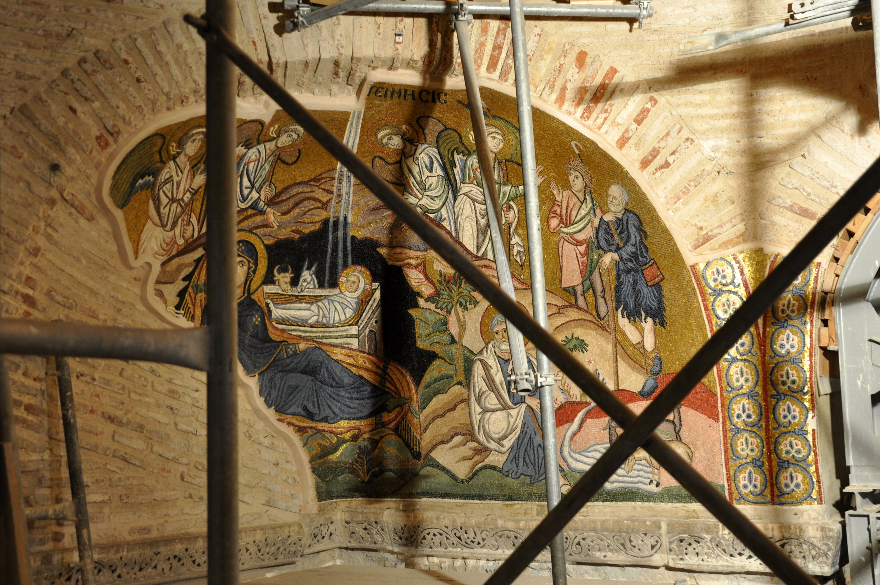 Klasztor w Dafni, obrzeża Aten. Narodziny. Dzięki ustawionym jeszcze rusztowaniom prac zabezpieczających, po trzęsieniu ziemi 1999. Jest styczeń 2011 i te cuda powróciły właśnie z konserwacji. Z bardzo bliska - ogromne wrażenie !